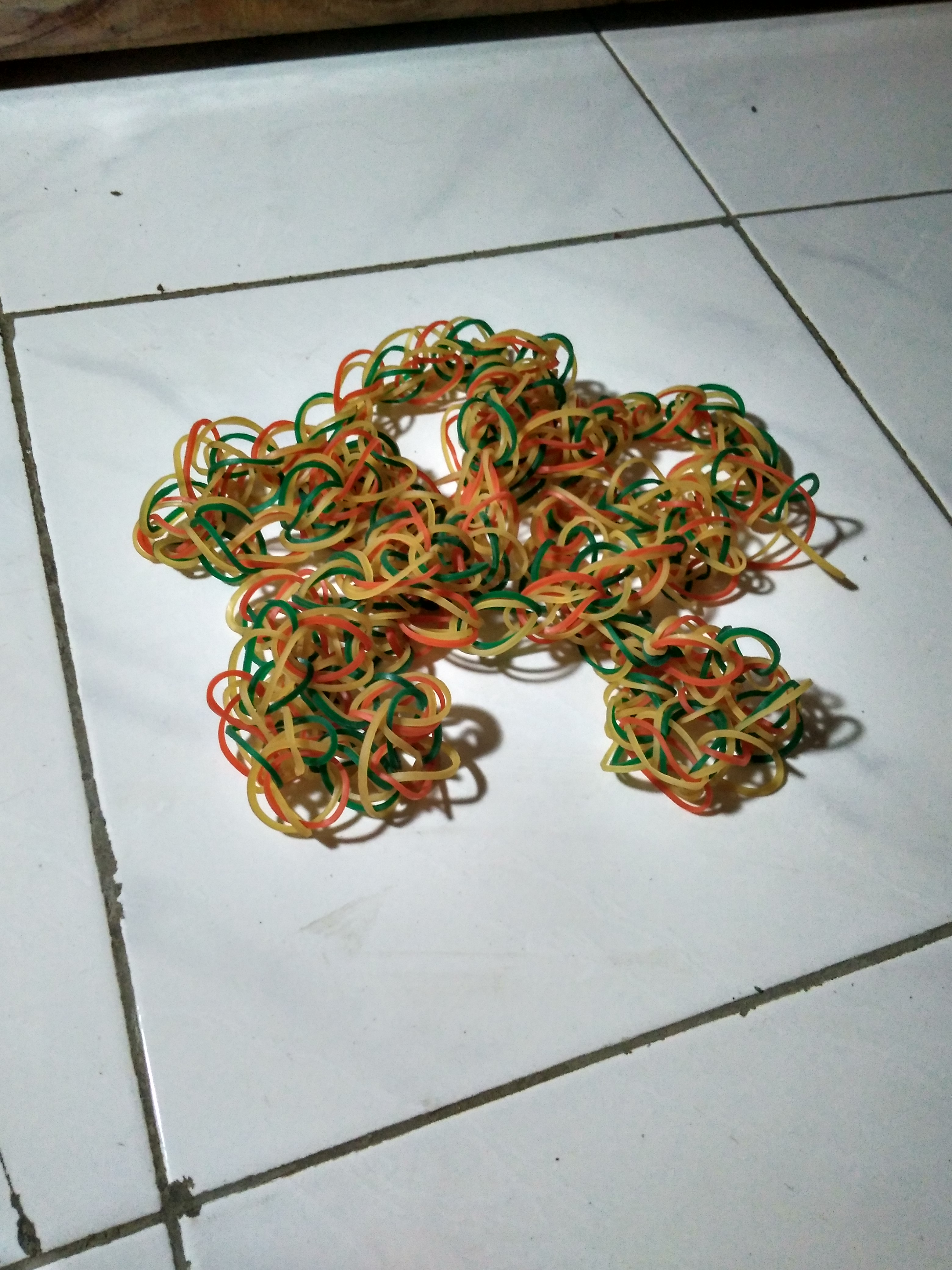 Karet gelang atau gelang karet adalah potongan karet berbentuk gelang yang dibuat untuk mengikat barang. Karet gelang terdiri dari berbagai macam ukuran, dari yang besar hingga yang kecil, dari yang tebal hingga yang tipis. Bahan baku karet gelang adalah karet alami sehingga berwarna kuning. Karet gelang berwarna-warni dihasilkan dengan menambahkan bahan pewarna. Produsen juga ada yang membuat karet gelang tahan minyak dan tahan segala cuaca. Sebagian besar karet gelang dibuat dari karet alami yang merupakan hasil pengolahan lateks dari pohon karet. Karet gelang juga dibuat dari karet sintetis, tetapi kalah populer dari karet alami yang elastis.